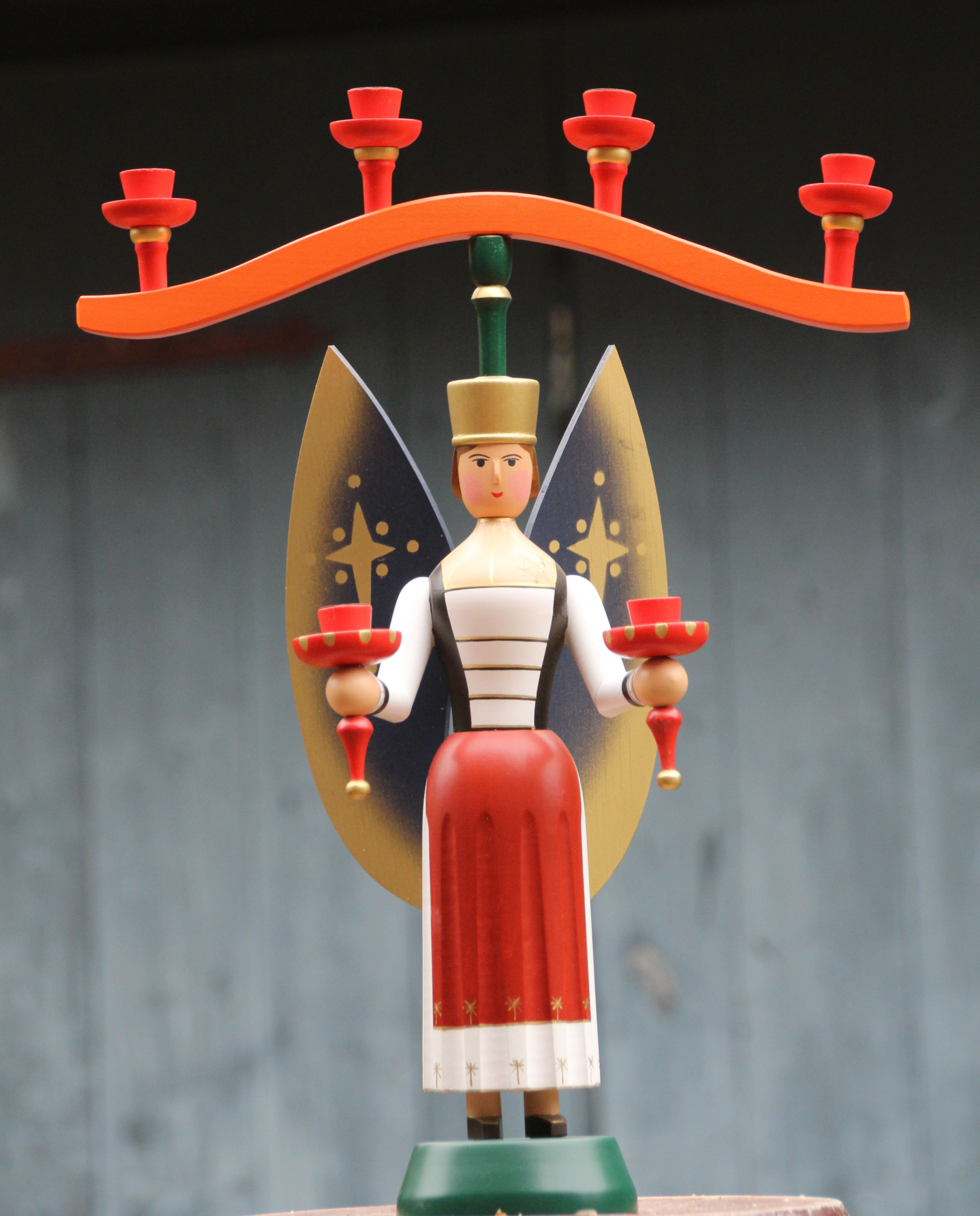 Aus der Werkstatt Breitfeld in Annaberg [1] ein erzgebirgischer Lichterengel in der selteneren Form der "Beinengel", erzgebirgisch „Baa-Engel“, bei denen der untere Teil der Beine und die Füße zu sehen sind – „Baa-Engel“. Hier trägt er zusätzlich einen Lichterkranz. Gesamthöhe 35 Zentimeter